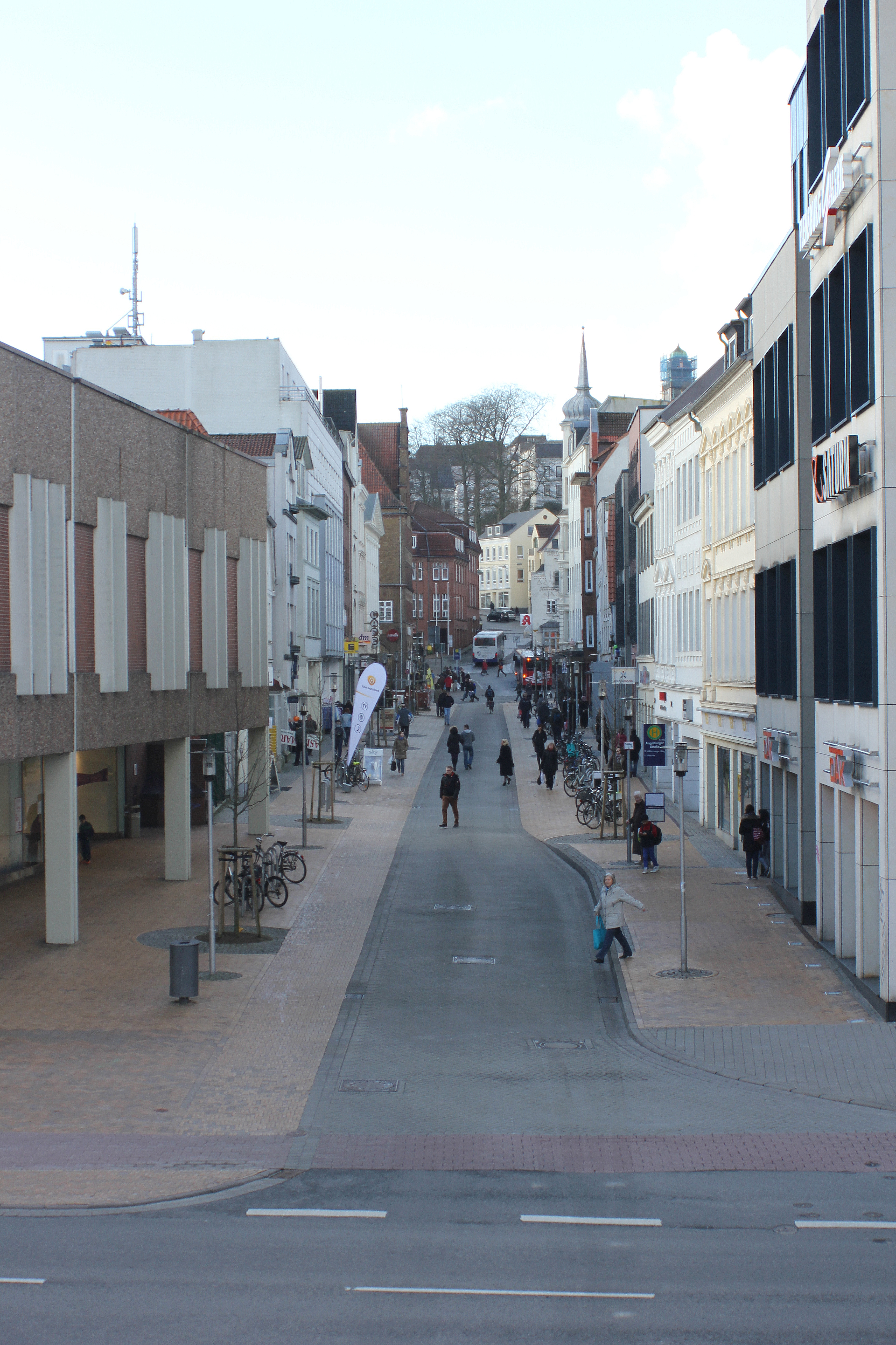 Westteil der Angelburger Straße (Flensburg 2014)